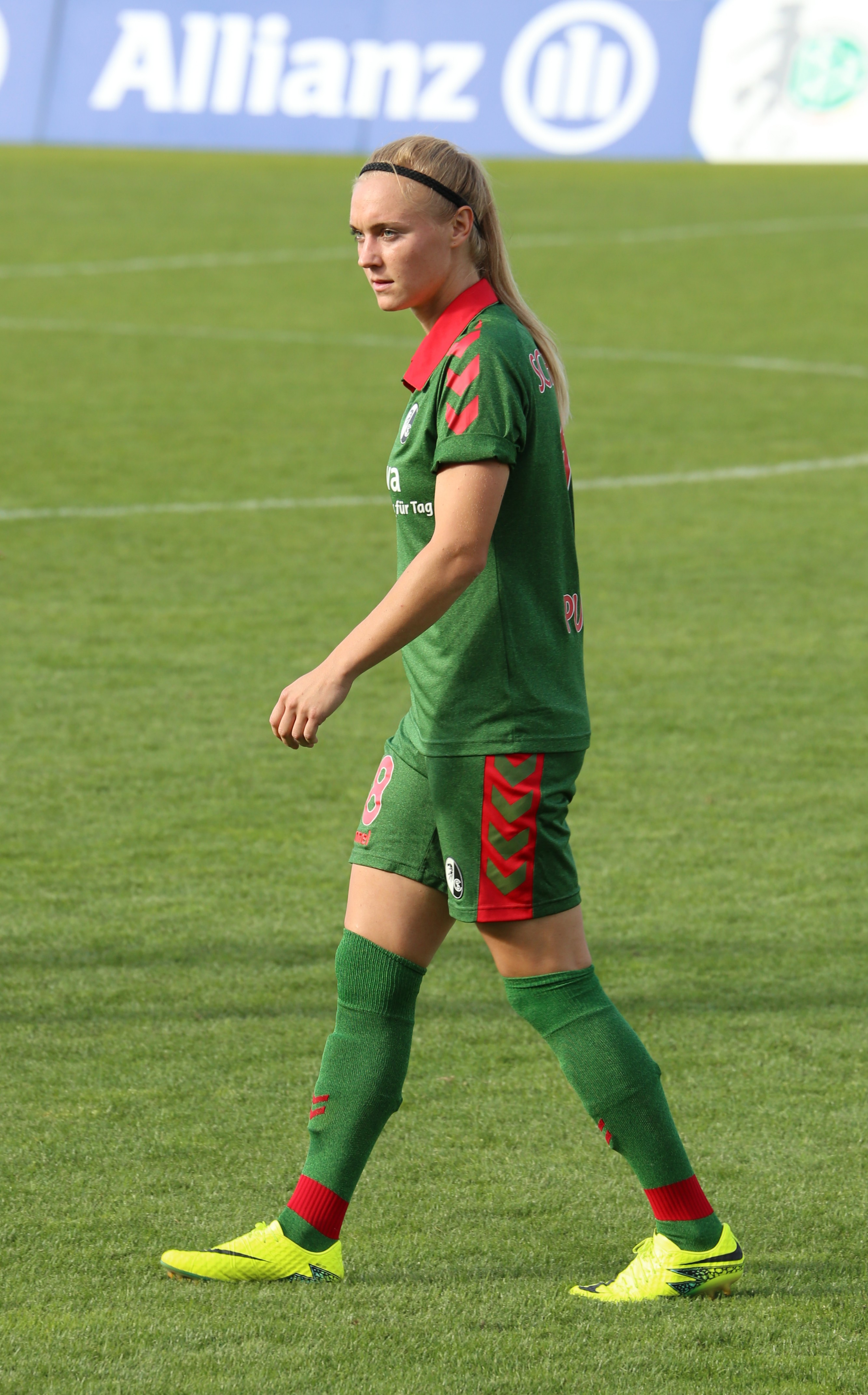 Sarah Puntigam, SC Freiburg, beim Frauen-Bundesliga-Spiel FC Bayern München gegen SC Freiburg am 3. September 2016 im Stadion an der Grünwalder Straße (Ergebnis war 1:1).